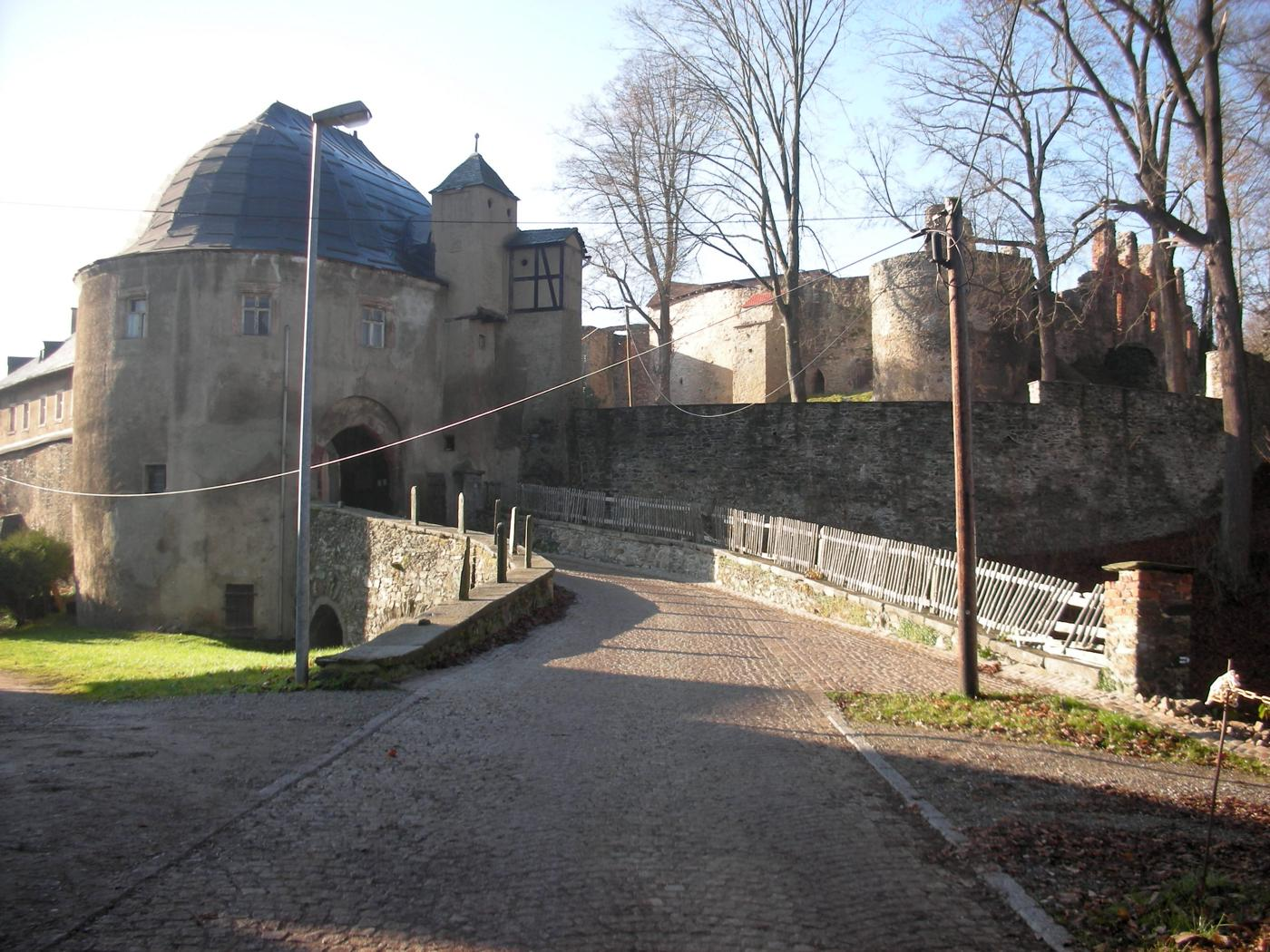 Außentor der Schlossruine Hartenstein